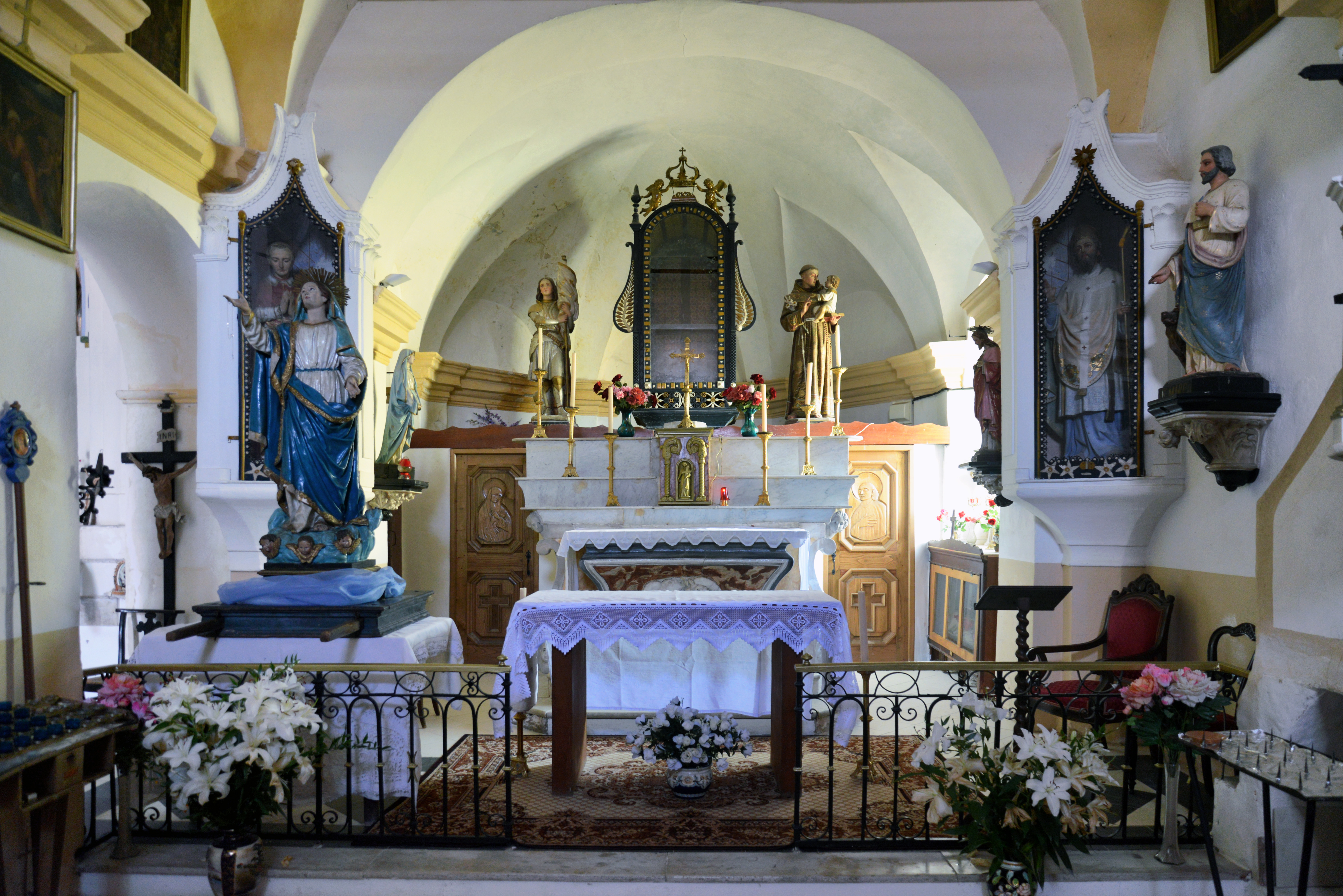 Avapessa, Balagne (Corse) - Chœur de l'église Santa Maria (1618)